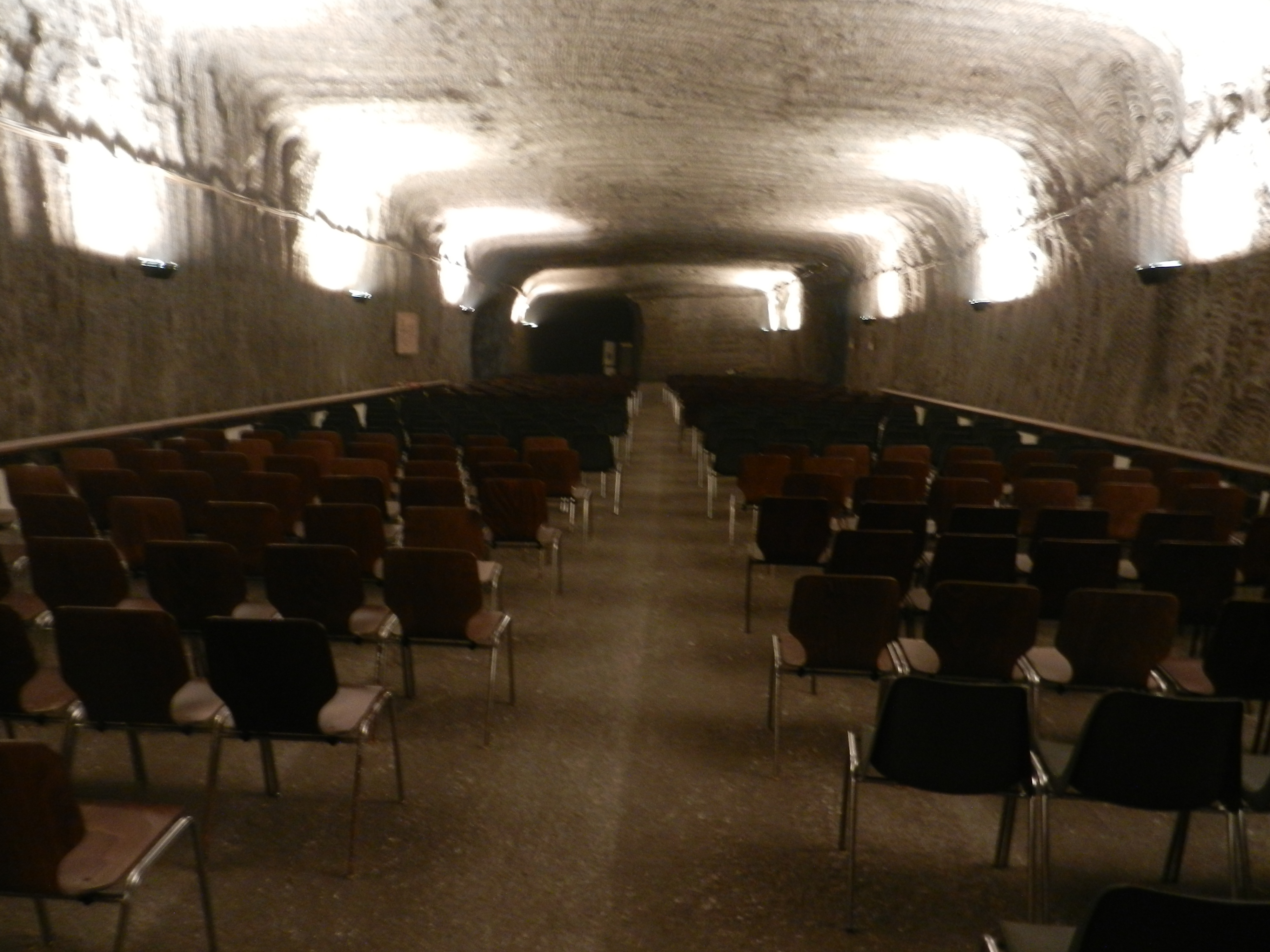 Salzbergwerk Stetten bei Haigerloch, Barbarasaal